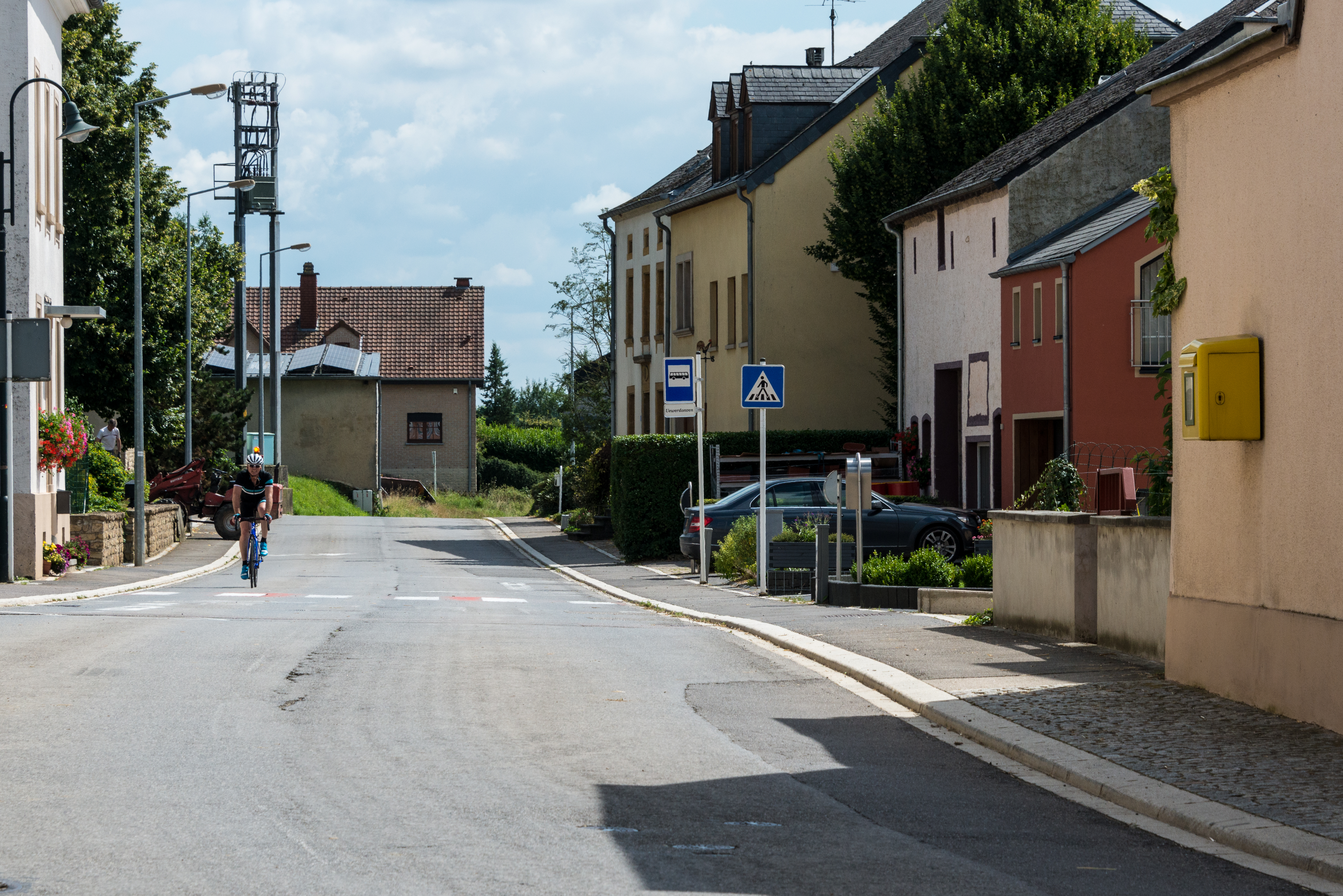 D'Rue de la Moselle (CR142) zu Uewerdonwen.